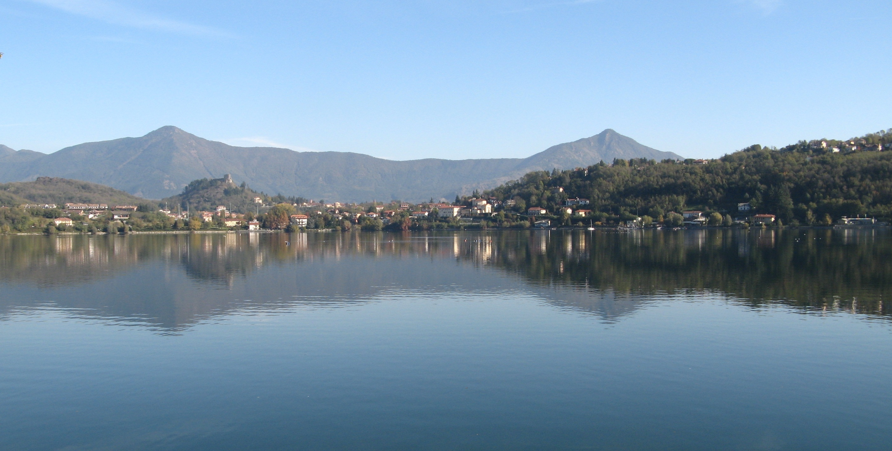 Foto del lago grande di avigliana. Sullo sfondo è possibile notare il castello sulla sinistra ed il Musine' sulla destra